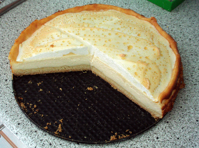 Thüringische Quarktorte mit Eischaum